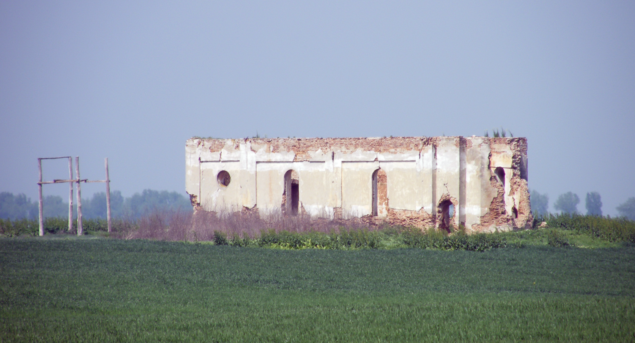 Biserica din satul Filiu comuna Bordei Verde in ruina - Exterior Restricţii - fără restricţii